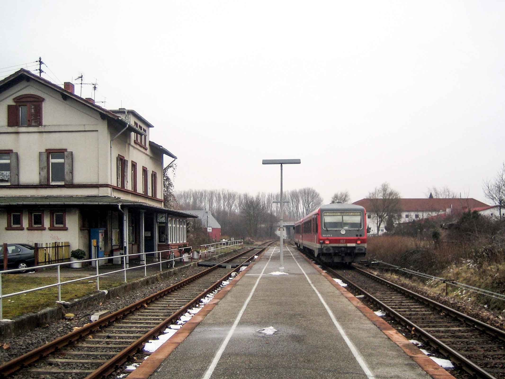 Bf. Godramstein